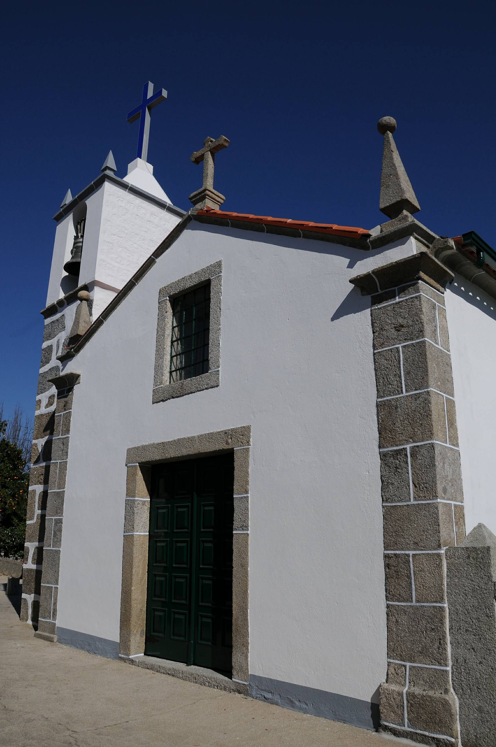 Lamas Church, in Braga, Portugal